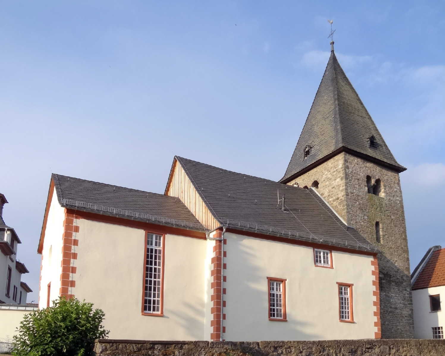 Evangelische Pfarrkirche Kirch-Göns